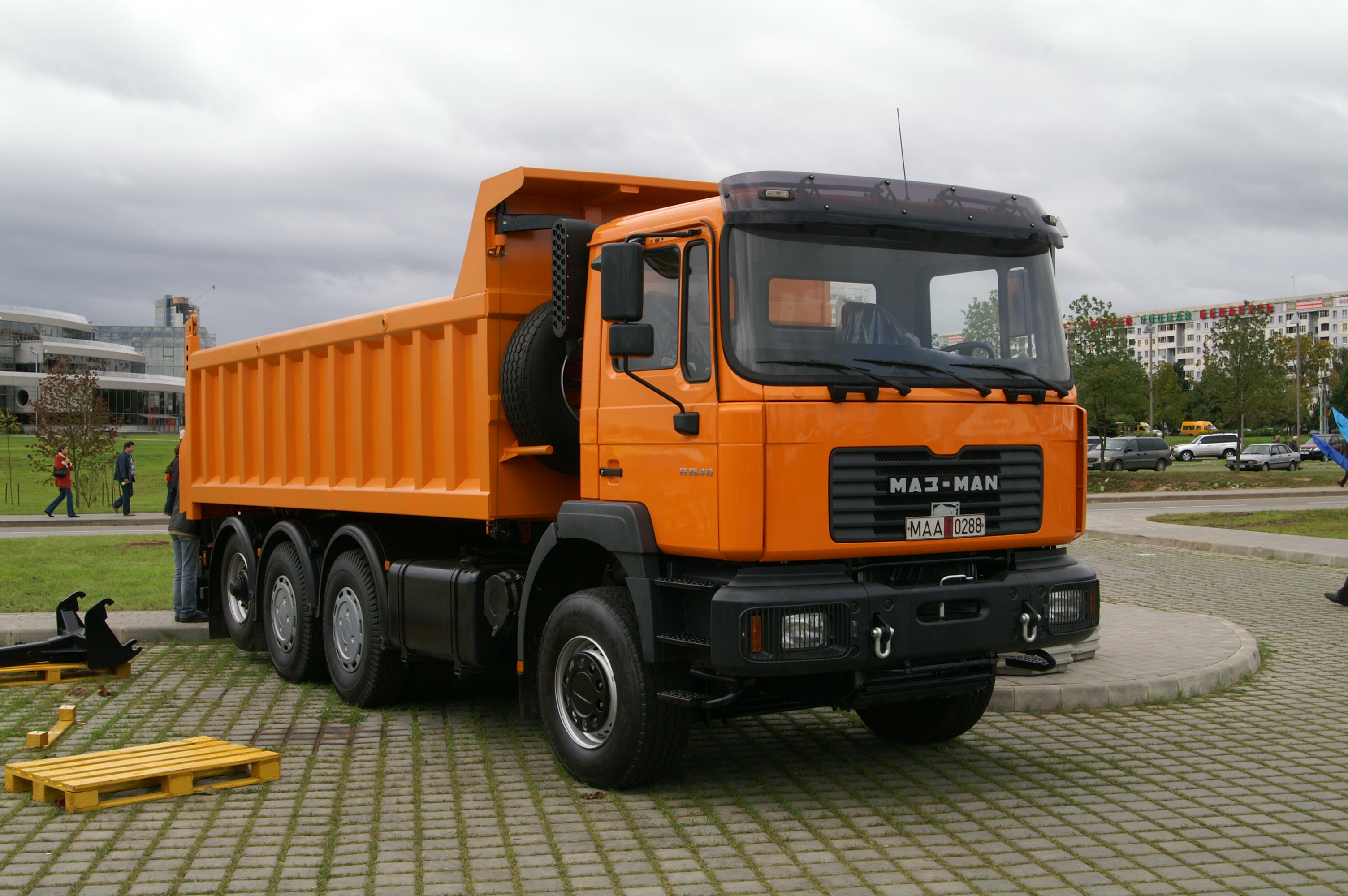 MAZ-MAN 750268 in Minsk